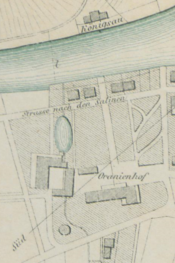 Oranienhof Kreuznach (Hotelneubau und Reste des Schlosses), 1875